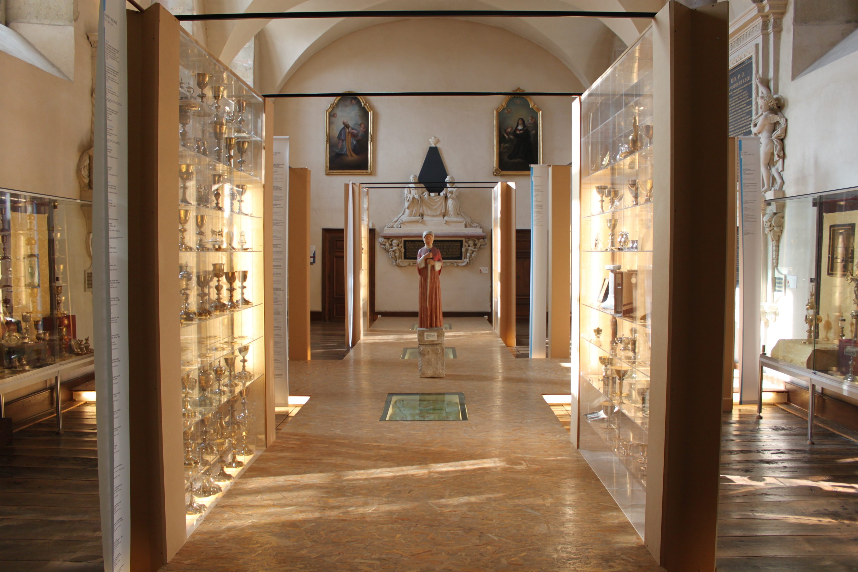 Musée d'art sacré de Dijon, Dijon, Côte-d'Or, Bourgogne, FRANCE